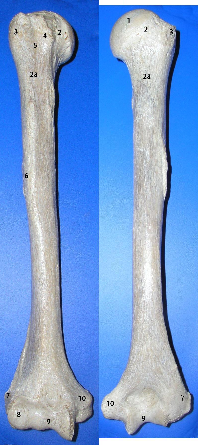 מקורות מתוך ויקישיתוף, נערכו על ידי והועלו מחדש.